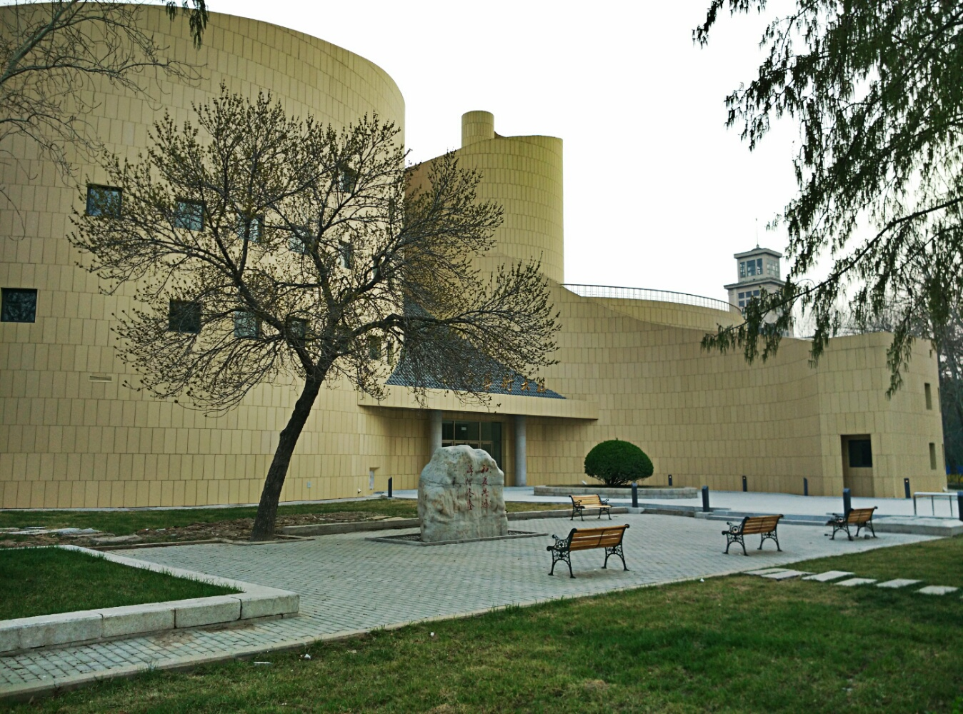 南开大学东方艺术系